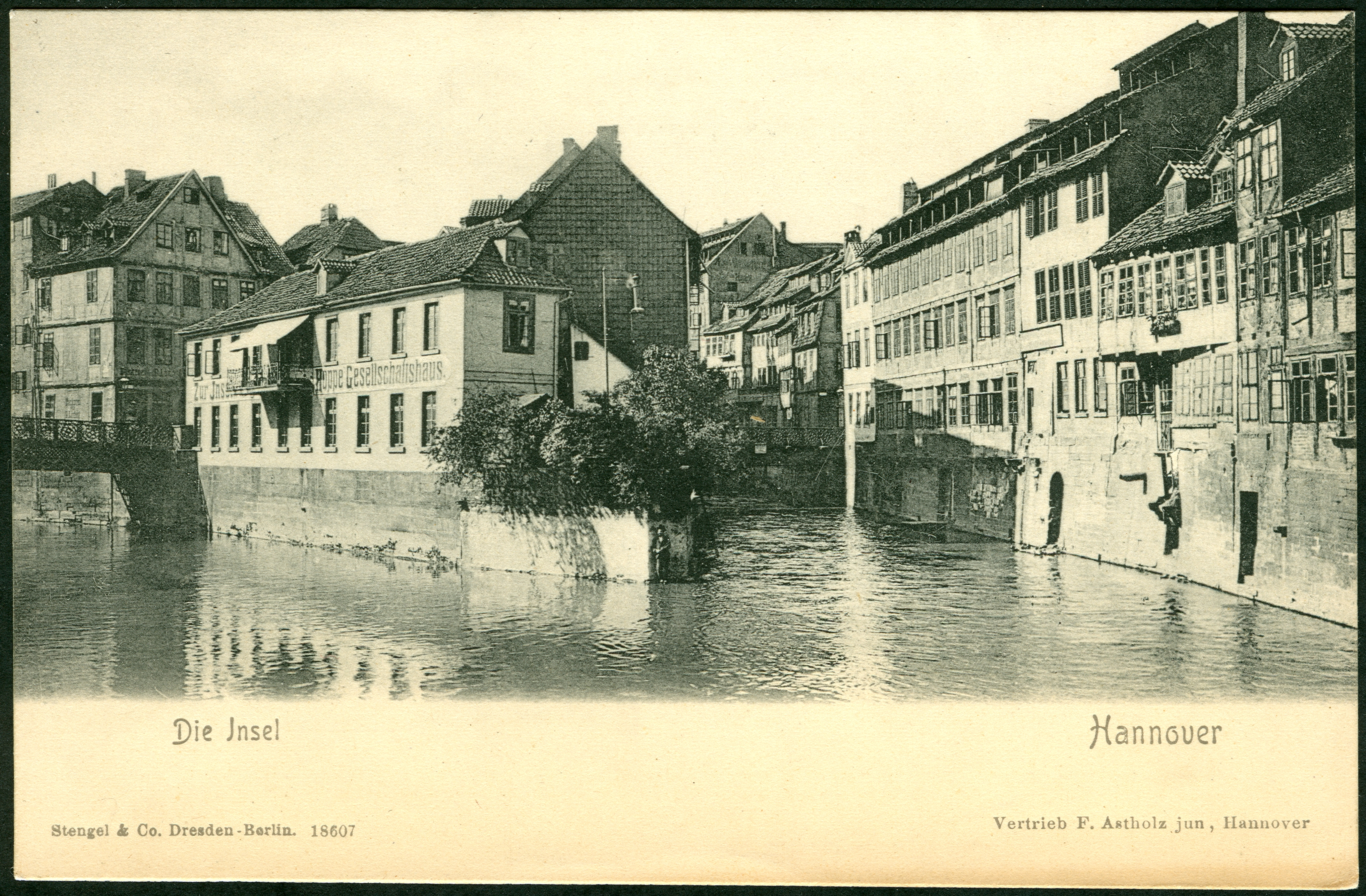 Die Insel, Hannover, eine von mehreren zehntausend fortlaufend nummerierten Ansichtskarten des Verlages Stengel & Co. mit Sitz in Dresden und Berlin. Die Karte wurde laut Zudruck von Friedrich Astholz junior vertrieben. Der Lichtdruck zeigt die auch als "Leineinsel Klein Venedig" bezeichnete Insel am Zusammenfluß der beiden ehemaligen Arme der Leine. Von links für die ehemalige Sommerbrücke in der Verlängerung der Pferdestraße über die Insel und weiter in die Calenberger Neustadt. Der rechts zu sehende Leinearm wurde nach dem Zweiten Weltkrieg zugeschüttet zur Anlage der Straße Leibnizufer; anstelle der in der Bildmitte zu sehenden Gebäude wurde ein Parkplatz angelegt.